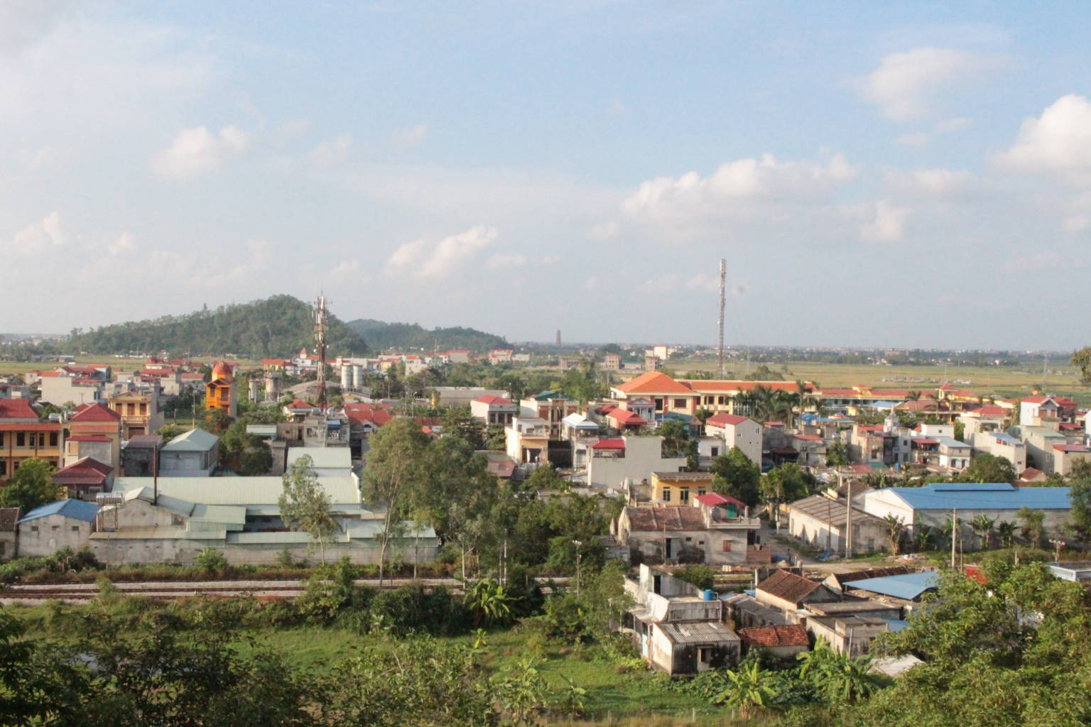 VuBan